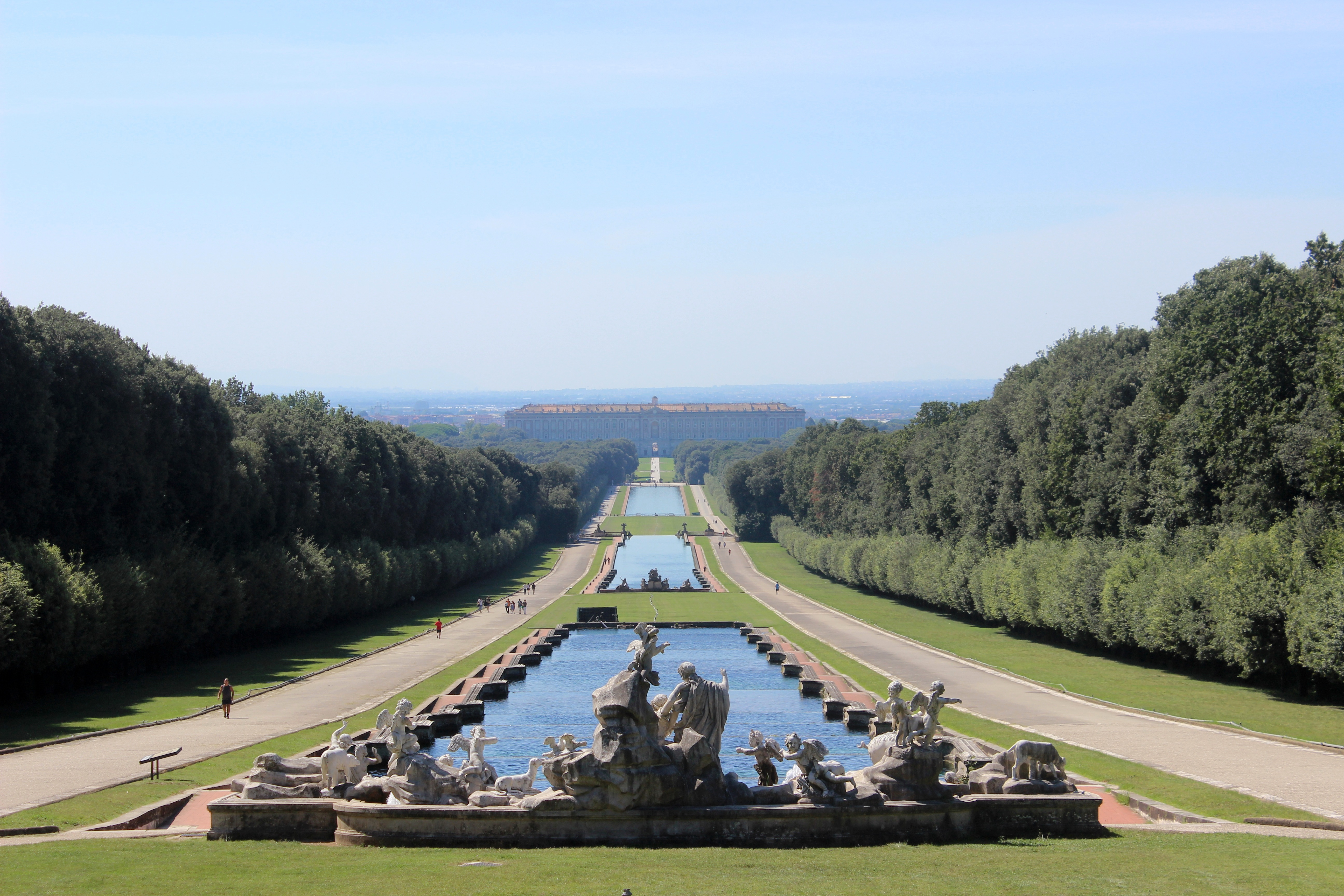 Caserta. Palacio real. Jardín.